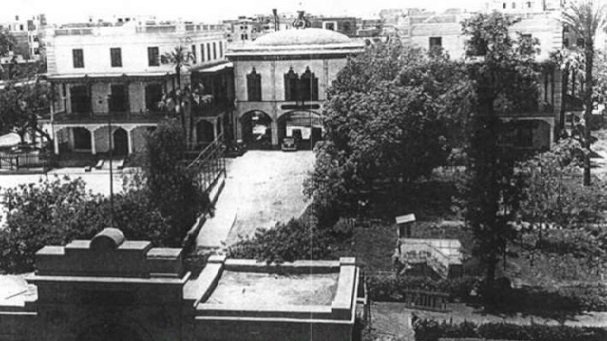 صورة قديمة مدرسة التوفيقية الثانوية بالقاهرة ، يرجح أنها ترجع لعام 1950